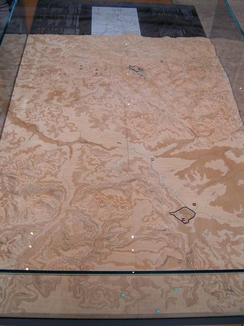 Ligging van Bibracte tov Autun